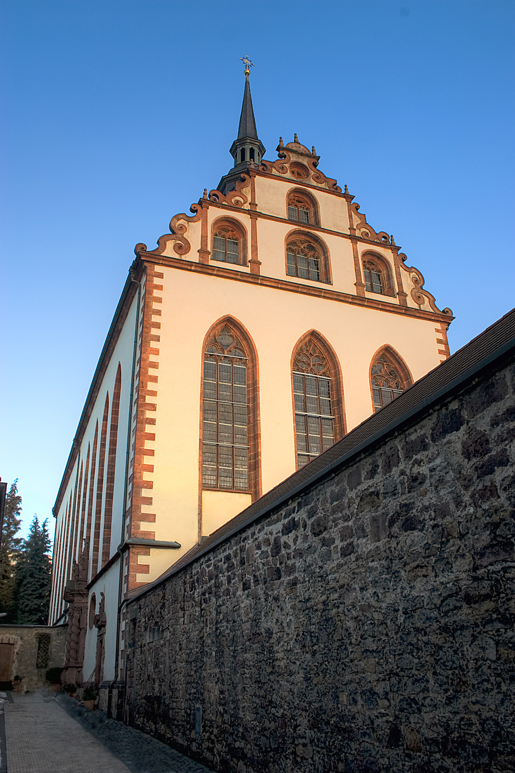 Benediktinerinnenabtei zur Heiligen Maria in Fulda. Kirche und Kloster wurden unter Johann Bernhard Schenk von Schweinsberg 1626-31 errichtet. Erst 1678 konnte der Kirchenbau unter Bernhard Gustav von Baden-Durlach vollendet werden.